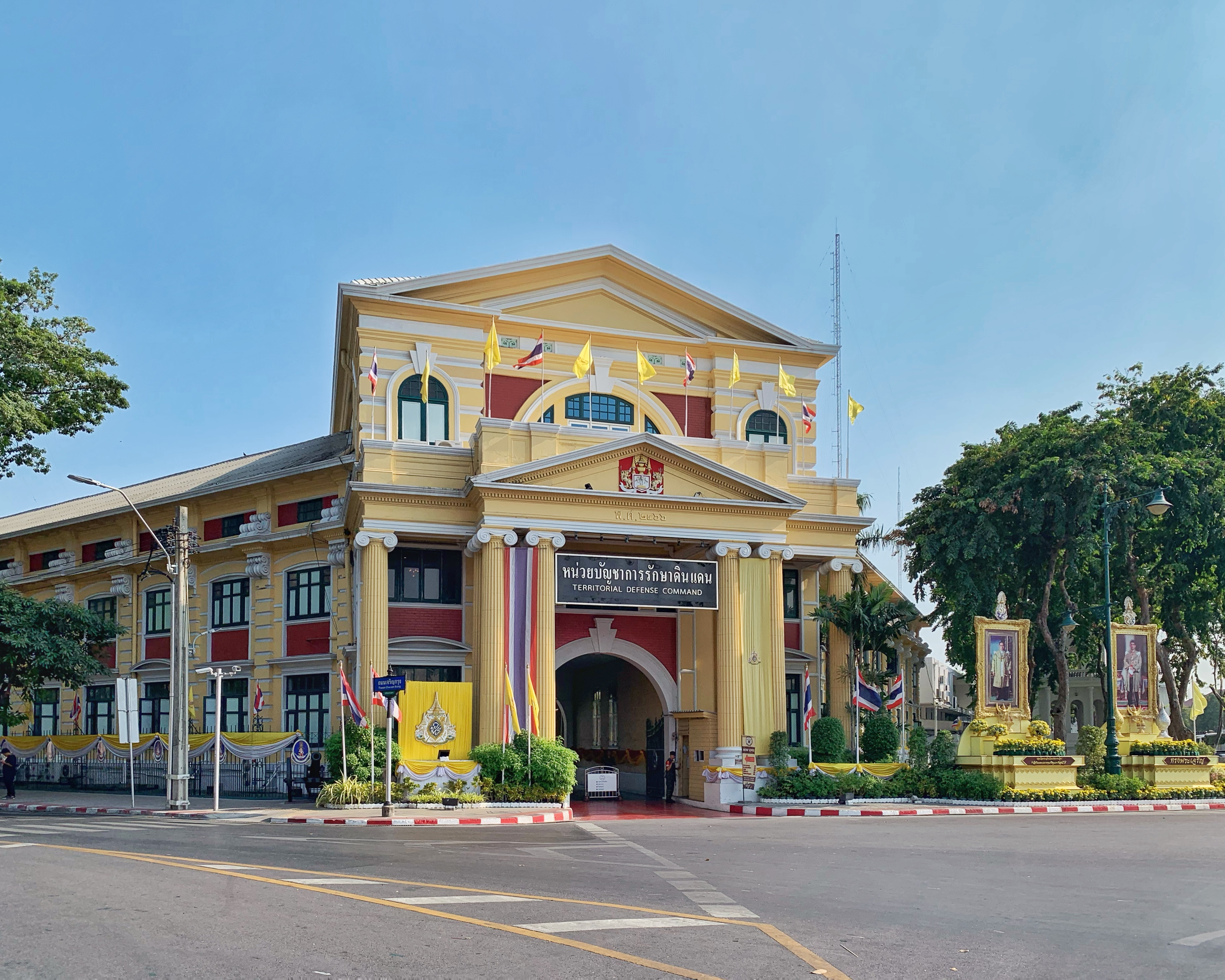 กรมรักษาดินแดน